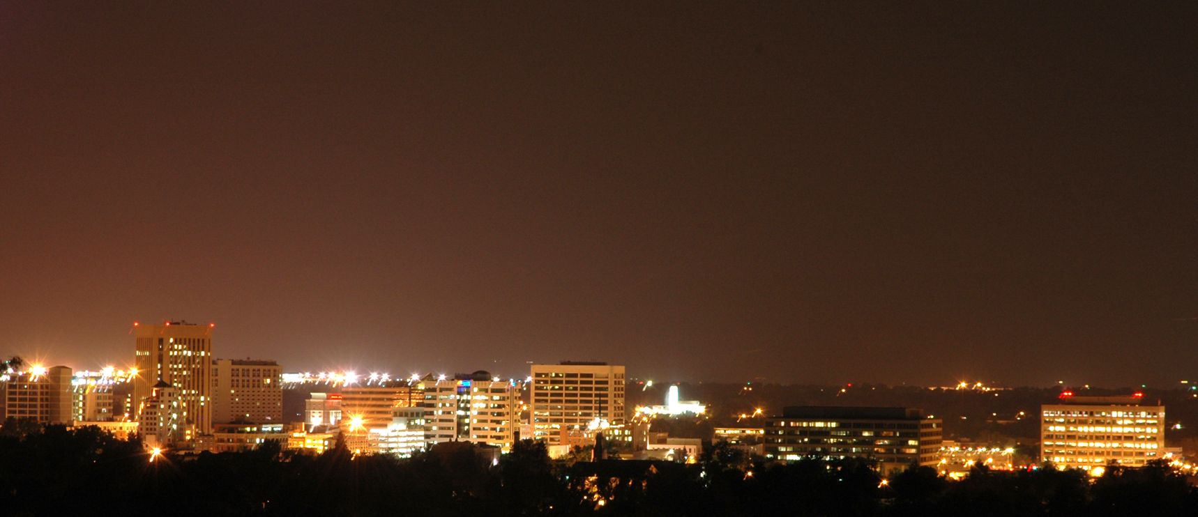 Boise, Idaho skyline.